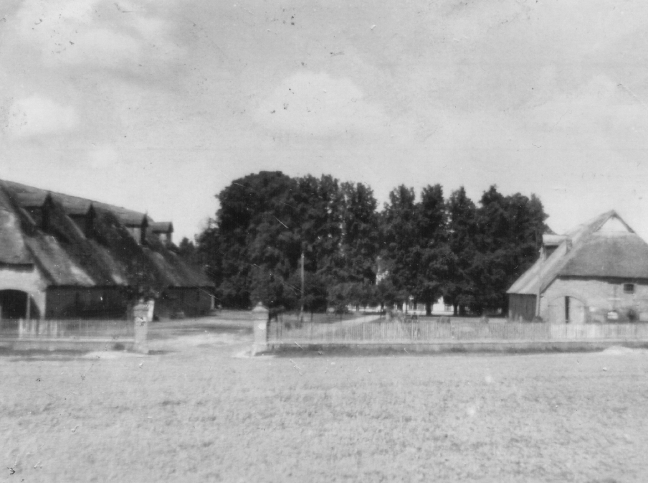 Gutshof Dolgen am See Datum: um 1943 Urheber: Rosemarie Pfeiffer, geb. v. Plessen Quelle: privates Fotoalbum der eigenen Familie Hinweis: das Foto wurde mir von der Urheberin, meiner Mutter, zur freien Verfügung überlassen